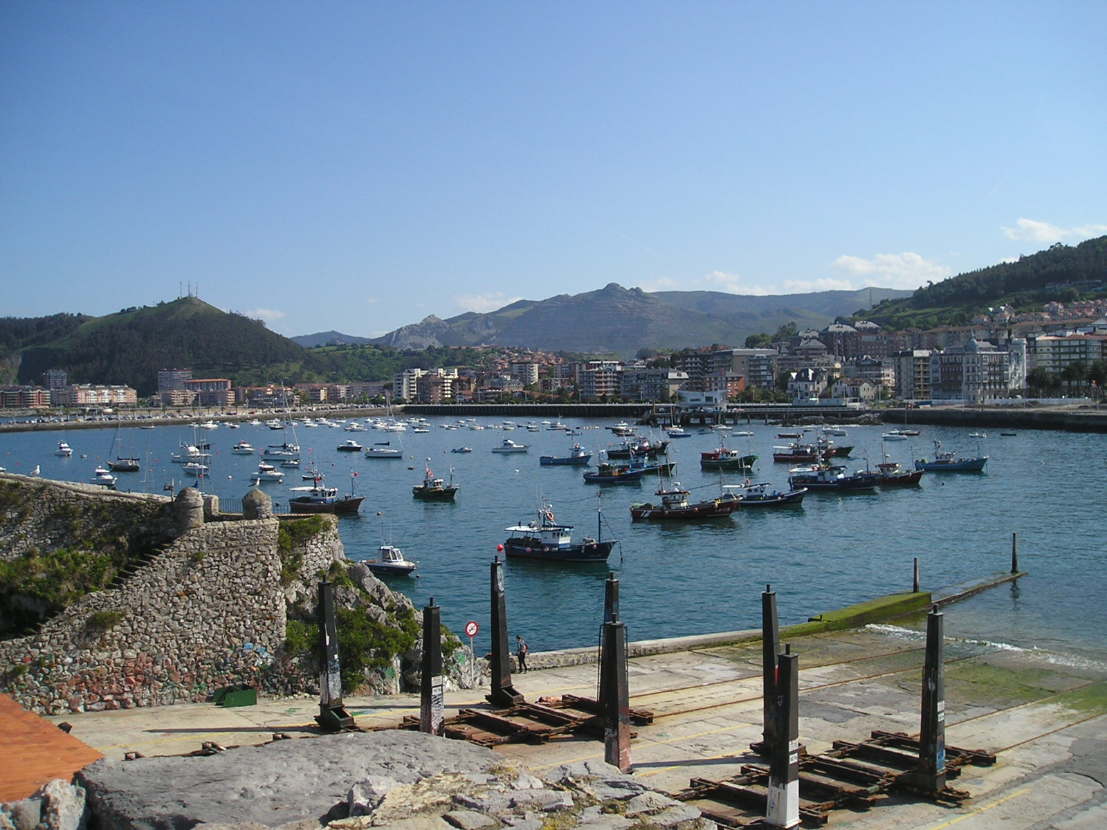 Castro Urdiales, localidad y municipio de Cantabria (España)